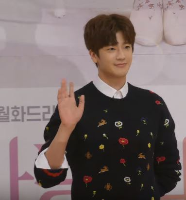 5월 3일 오전 서울시 양천구 목동 SBS에서 SBS 새 월화드라마 '초면에 사랑합니다' 제작발표회가 열려 배우 김영광X진기주X김재경X구자성 이 참석해 포토타임을 갖고 있다.